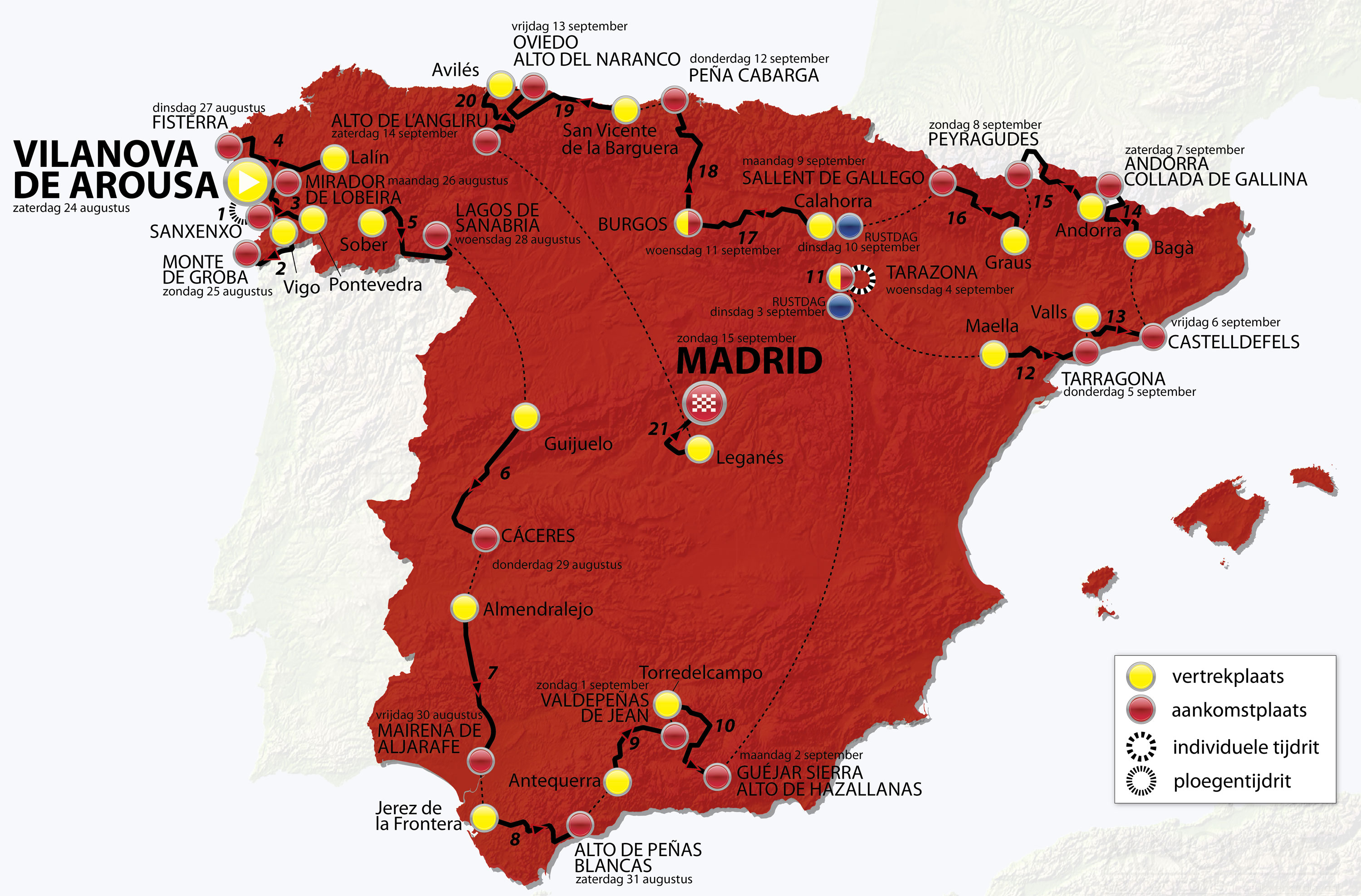 Parcours van de 68ste editie van de Vuelta a Espana in 2013